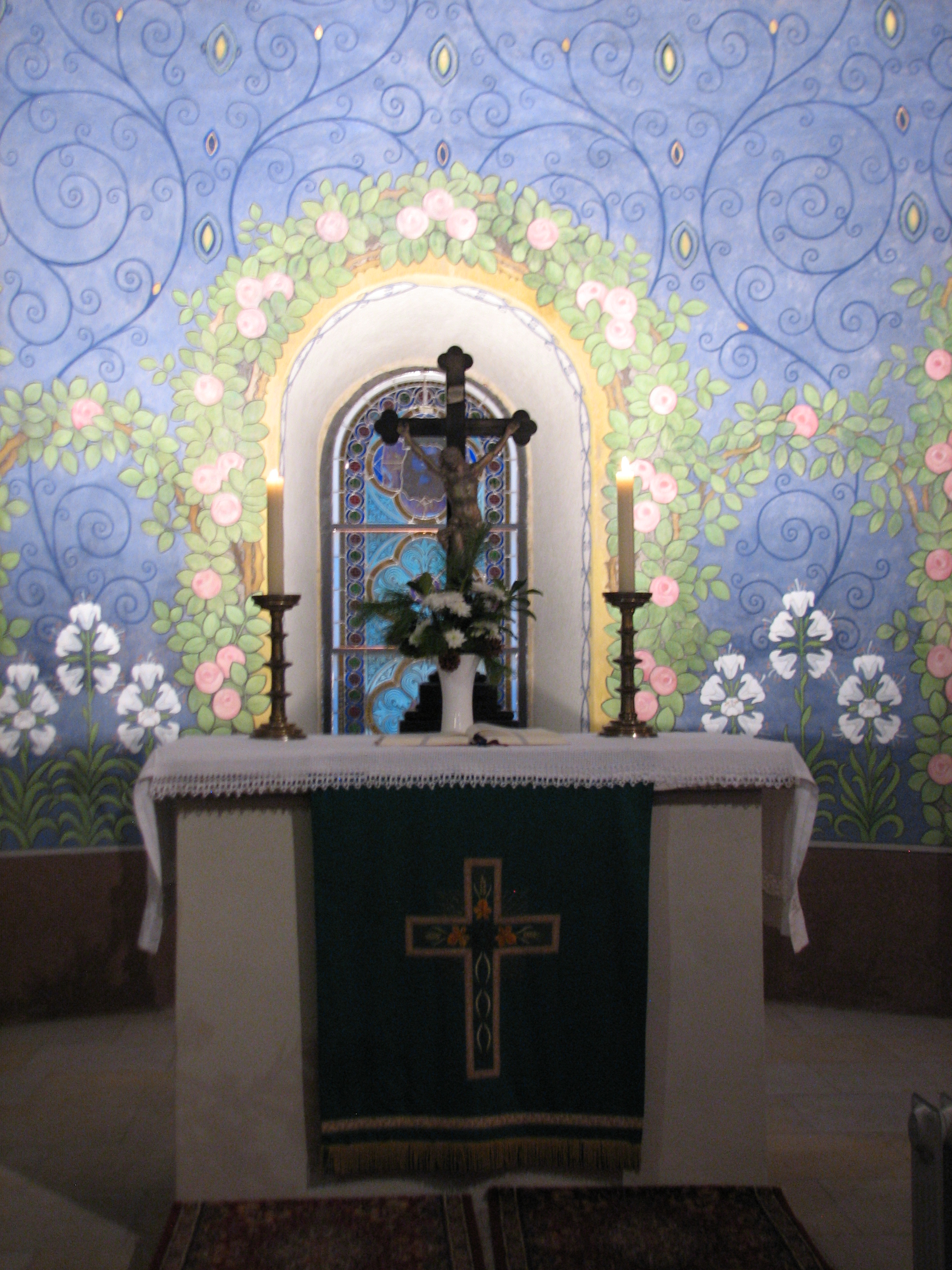 Altar (ohne Blitzlicht fotografiert)